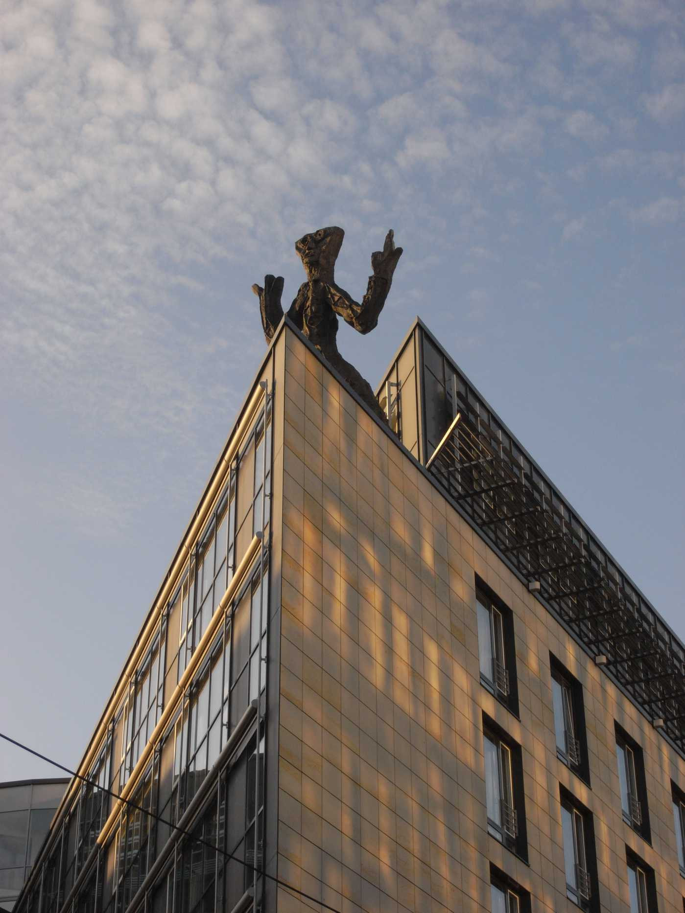 Das Art'otel an der Ostra-Allee in Dresden mit einer Plastik von A.R. Penck (Sachsen, Deutschland)